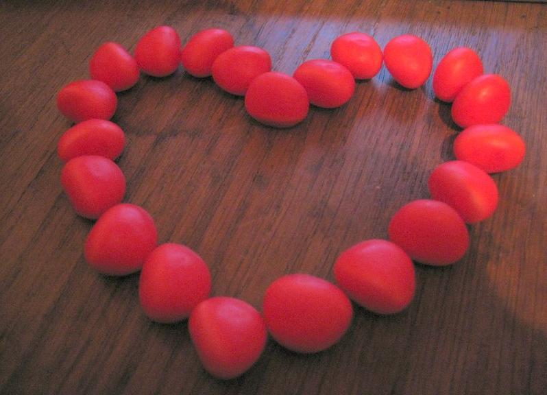 Floppys disposés en forme de coeur